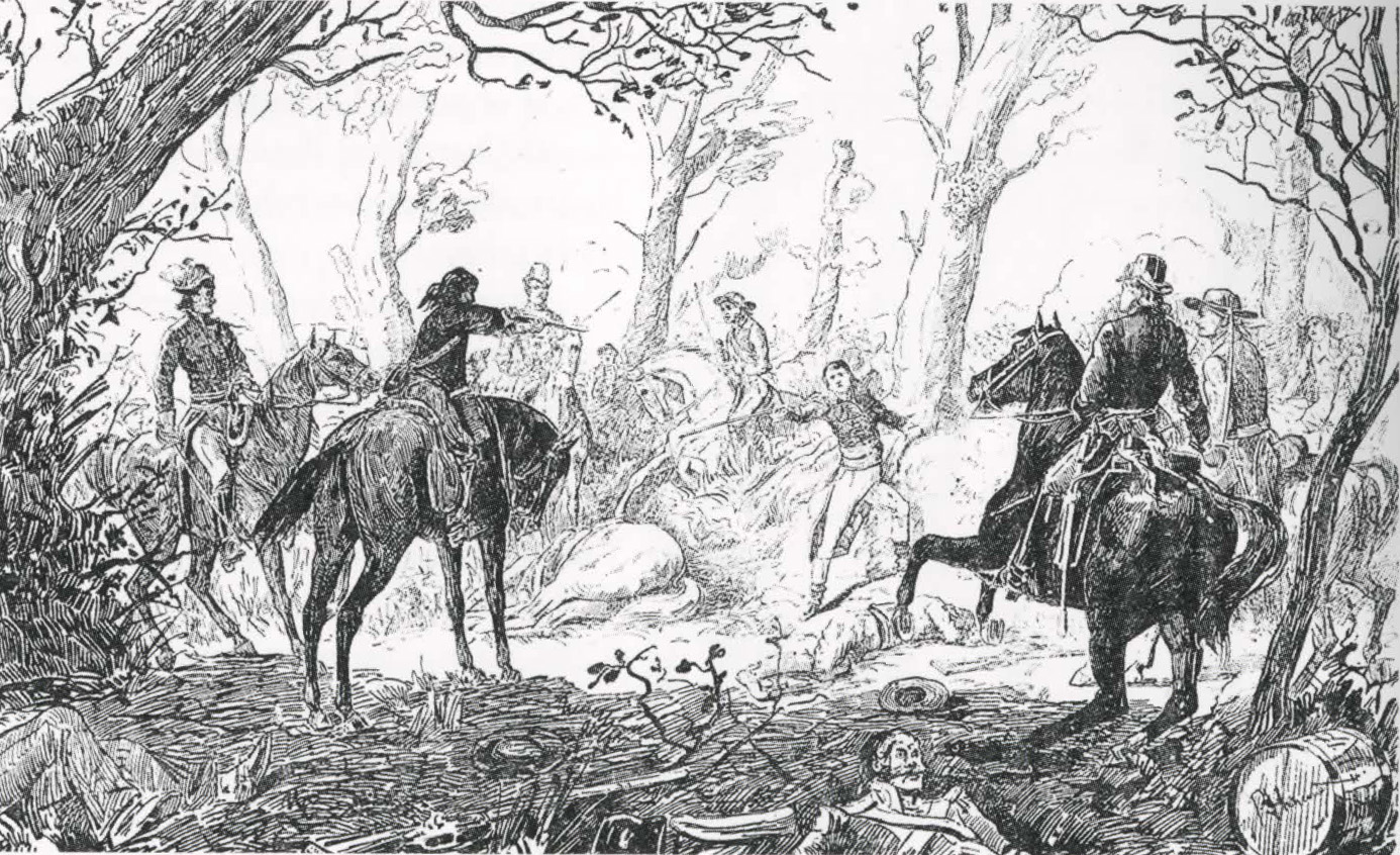 Mort du général Haxo à la bataille des Clouzeaux, guerre de Vendée, 1794.